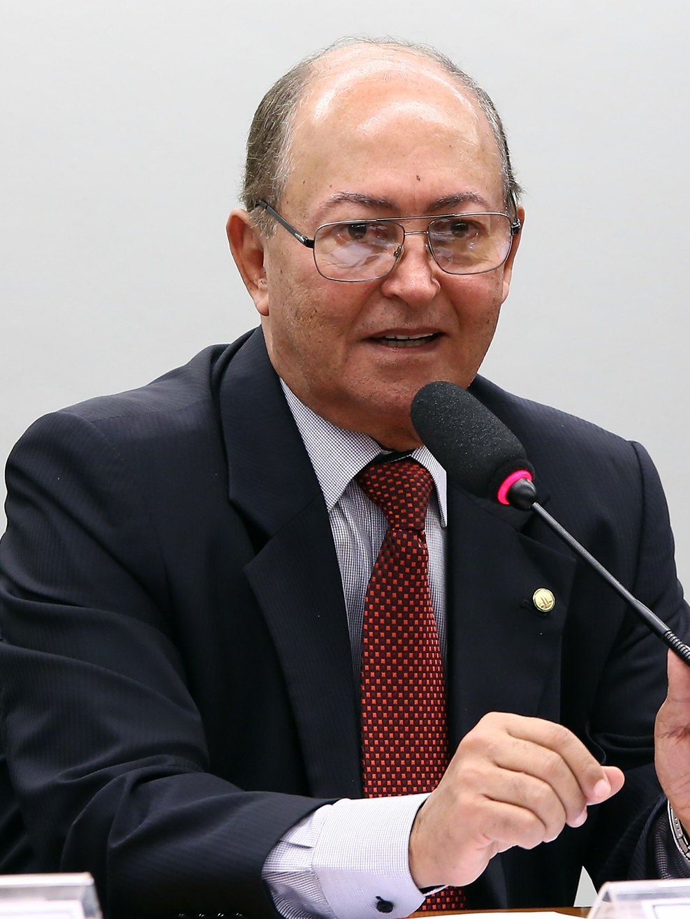 Lázaro Botelho em dezembro de 2016.